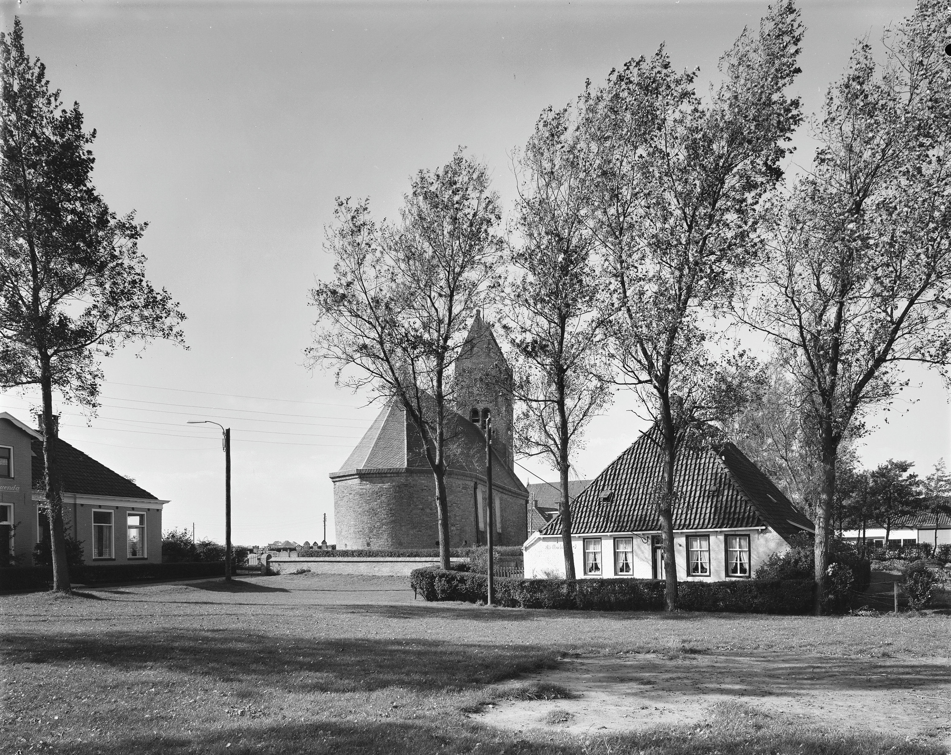 Nederlands Hervormde Kerk: overzicht noord-oost zijde